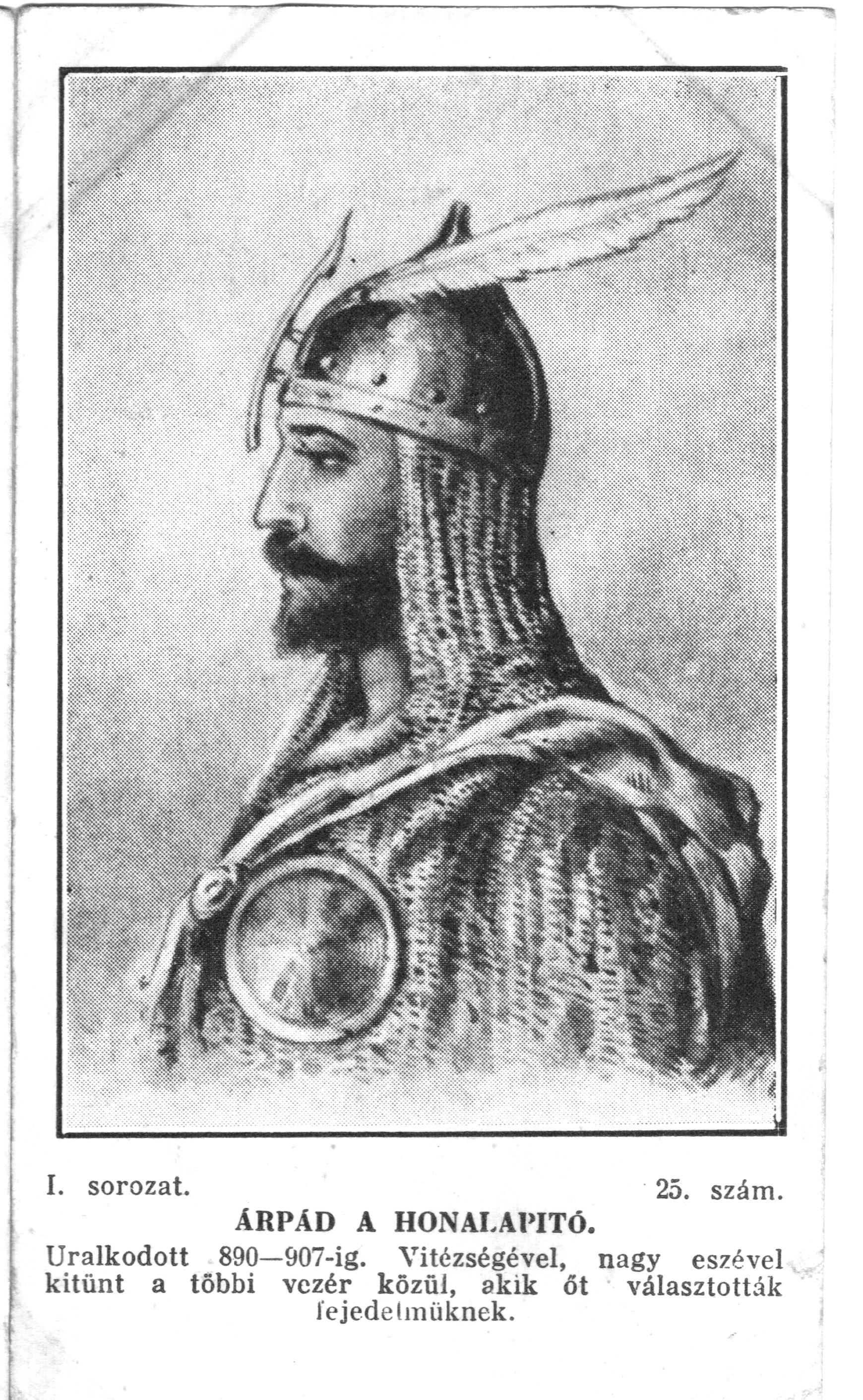 "Árpád a honalapító." -- Árpád fejedelmet mintázó rajz.